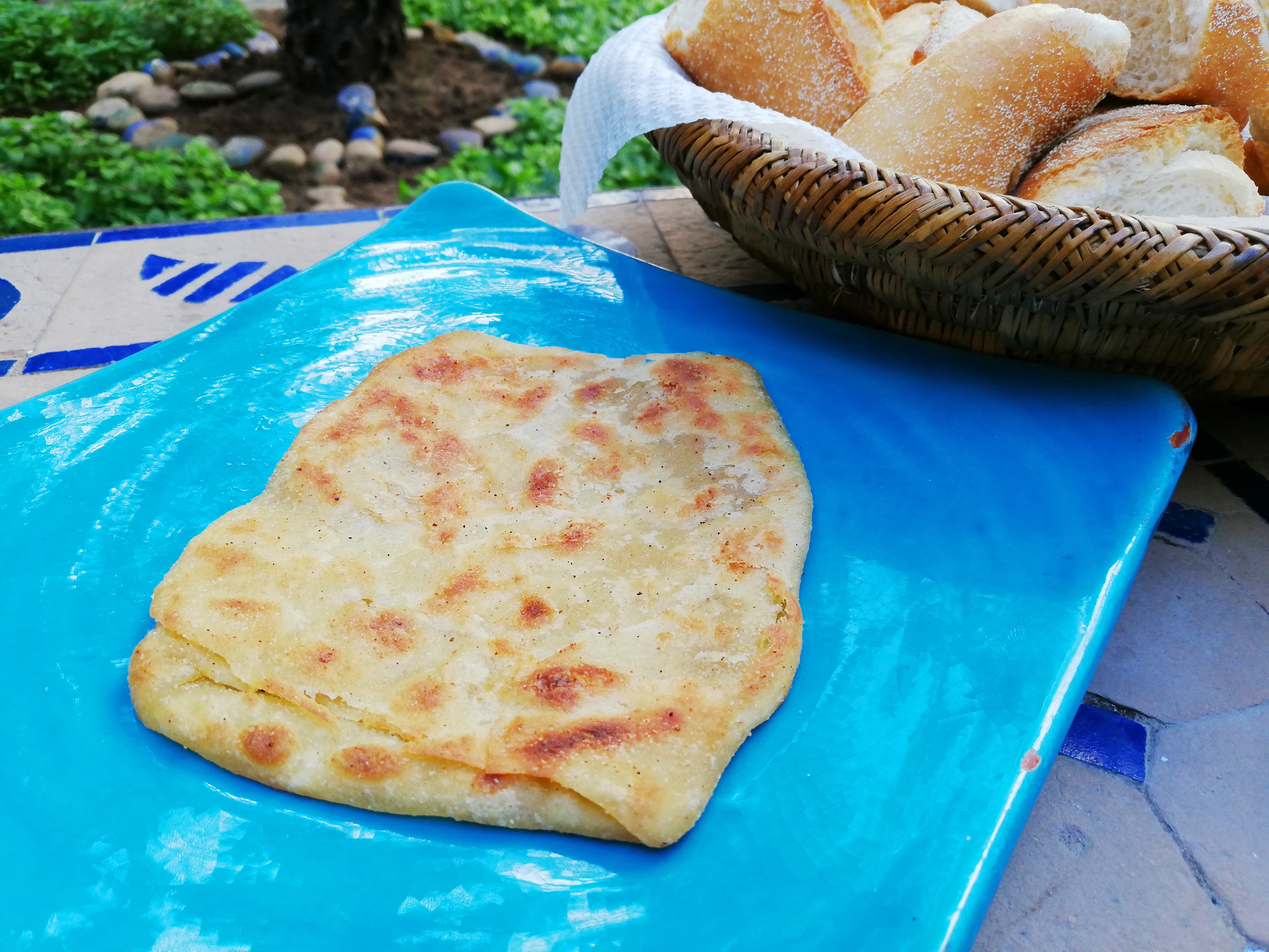 Une msemmen marocaine